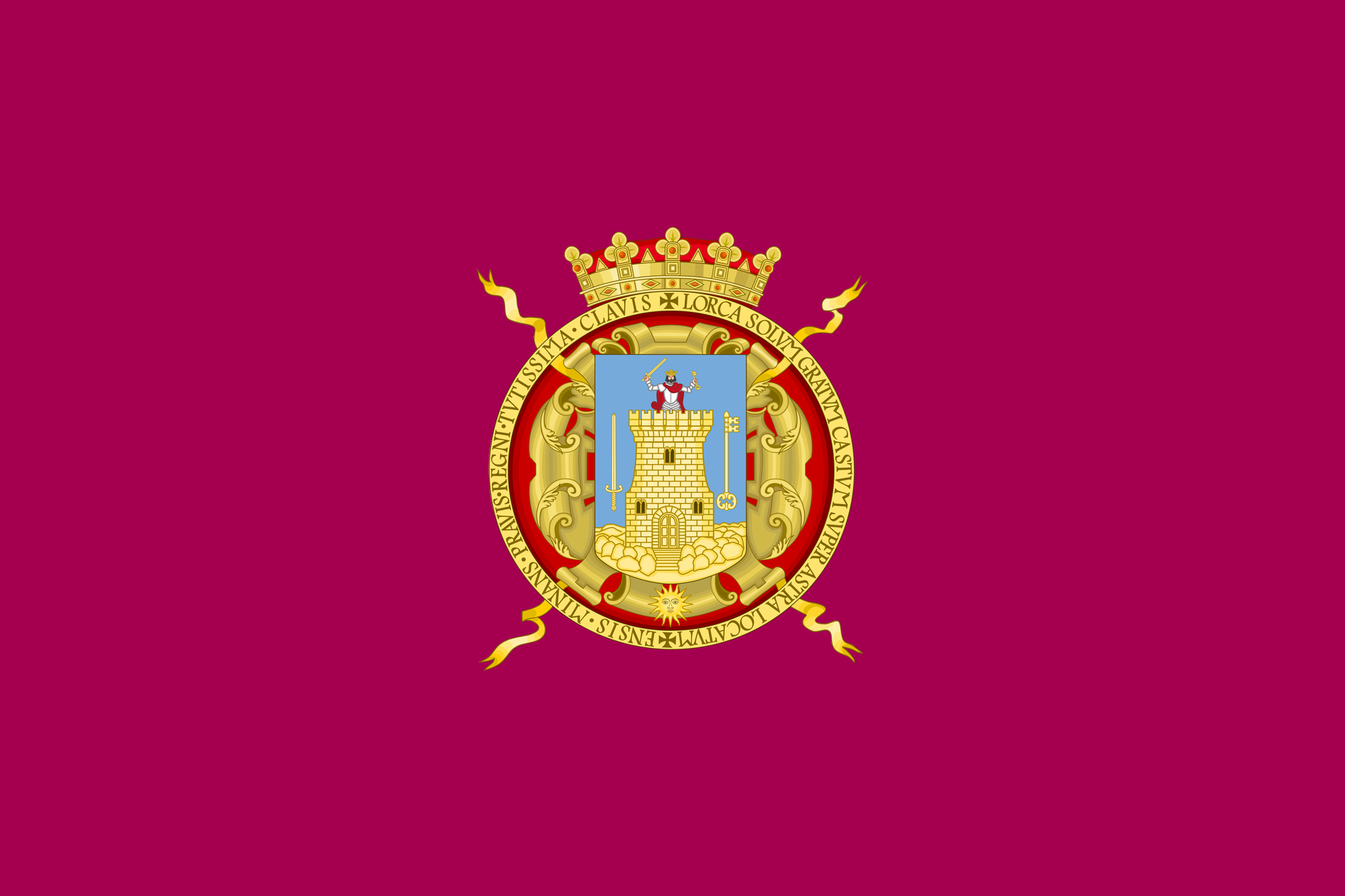 Bandera de la ciudad de Lorca.